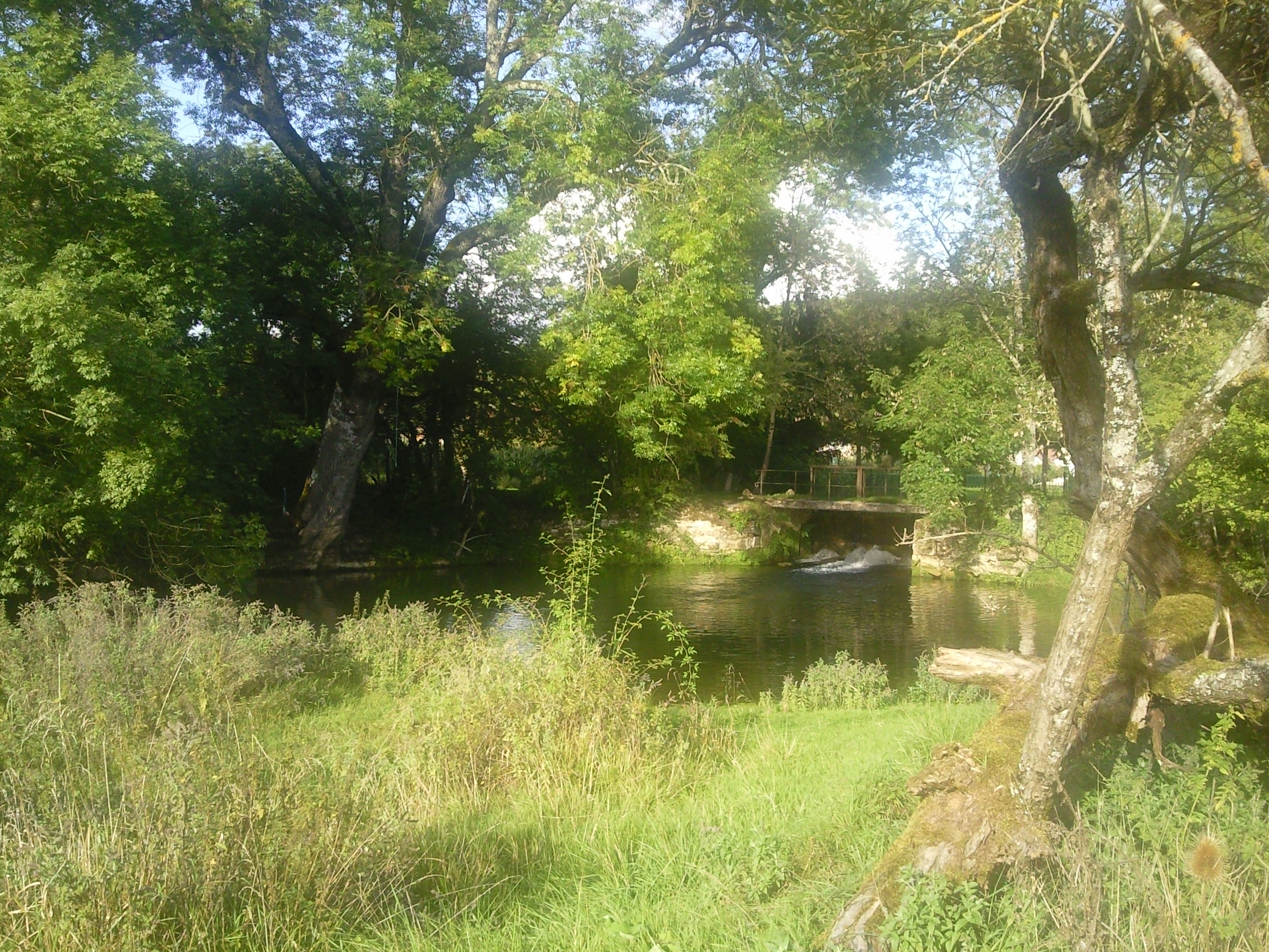 Ecluse à Saucourt sur Rognon